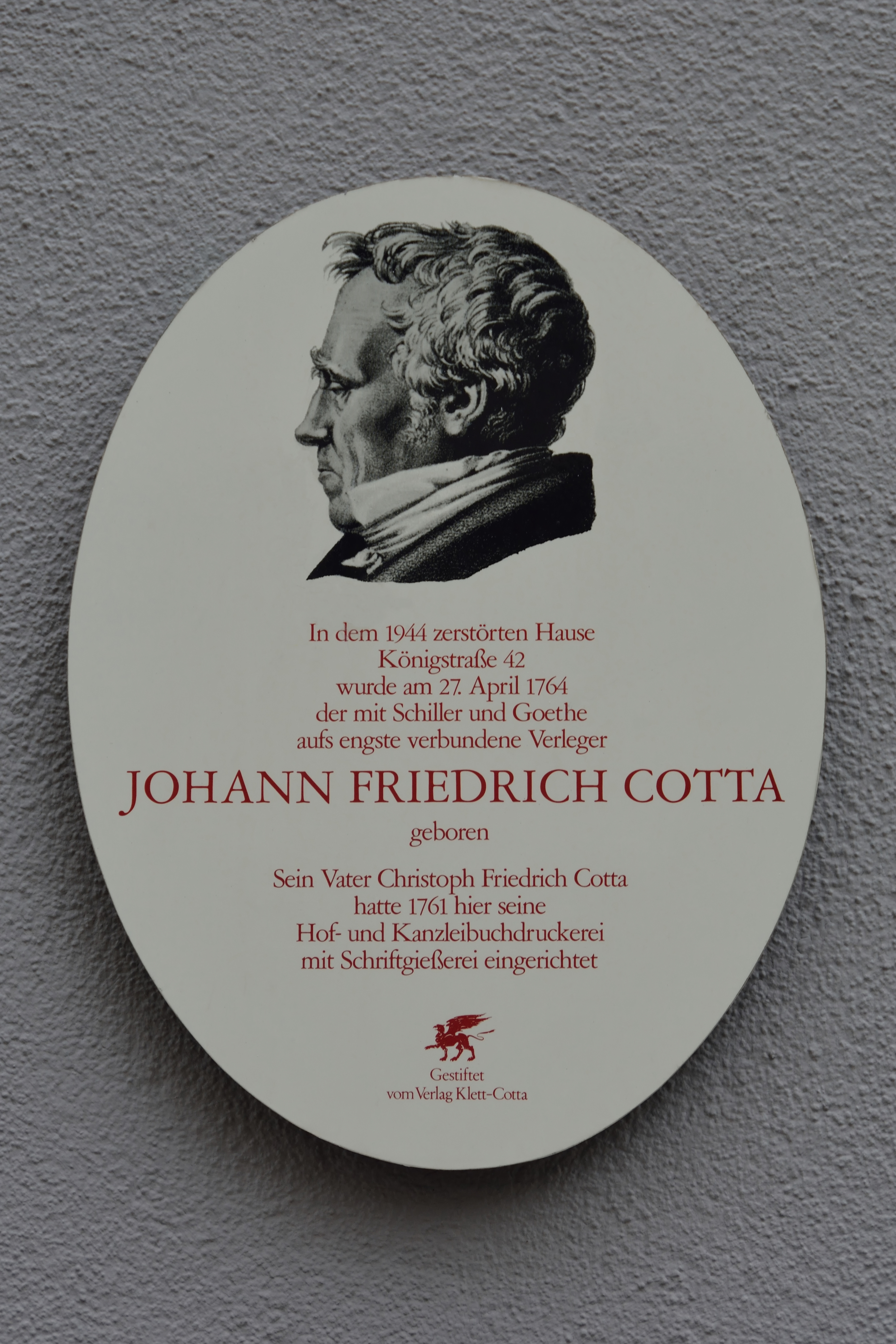 Eine Gedenktafel am Haus Königsstraße 42 für Johann Friedrich Cotta